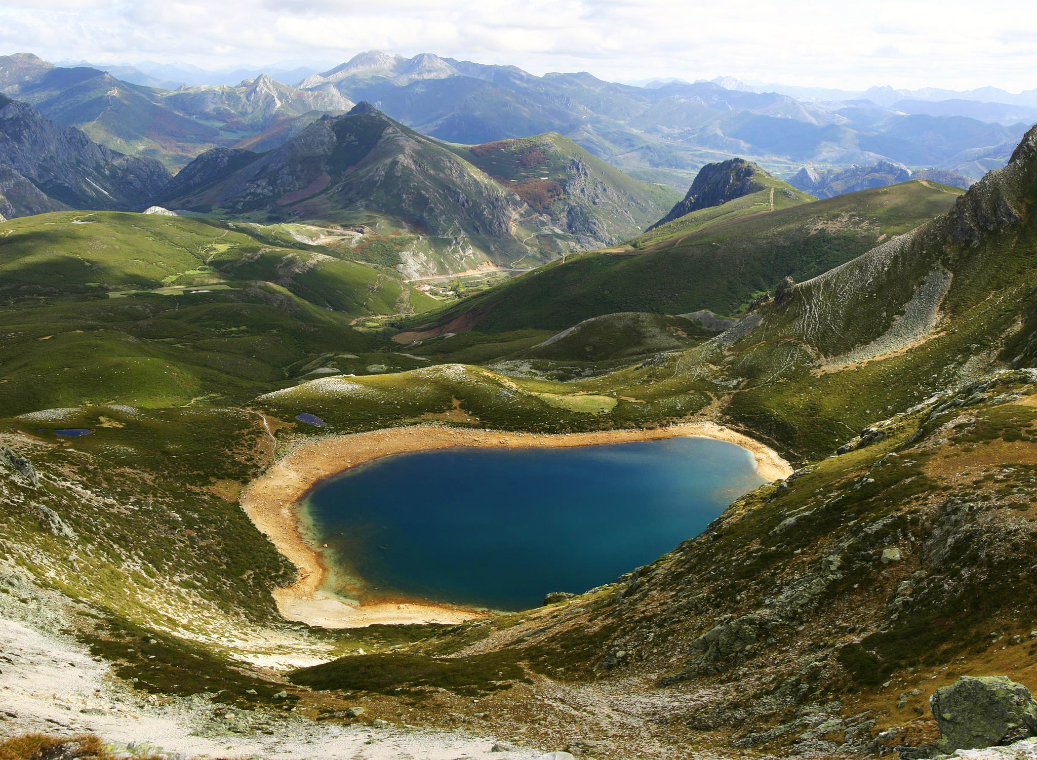 Lago Ausente. Comarca del Alto Porma, León, País Leonés.